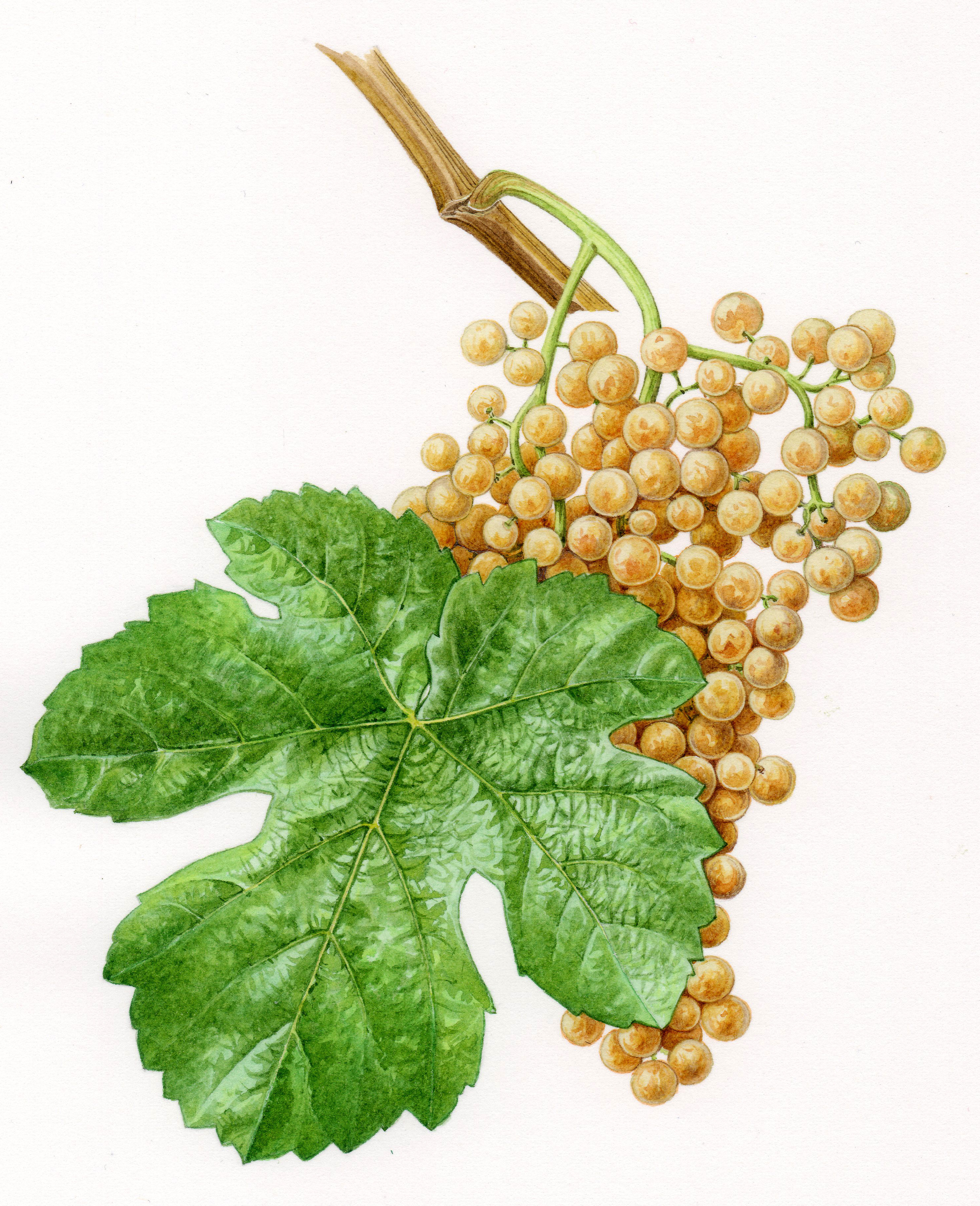 aquarelle originale, série des cépages de France (2001)